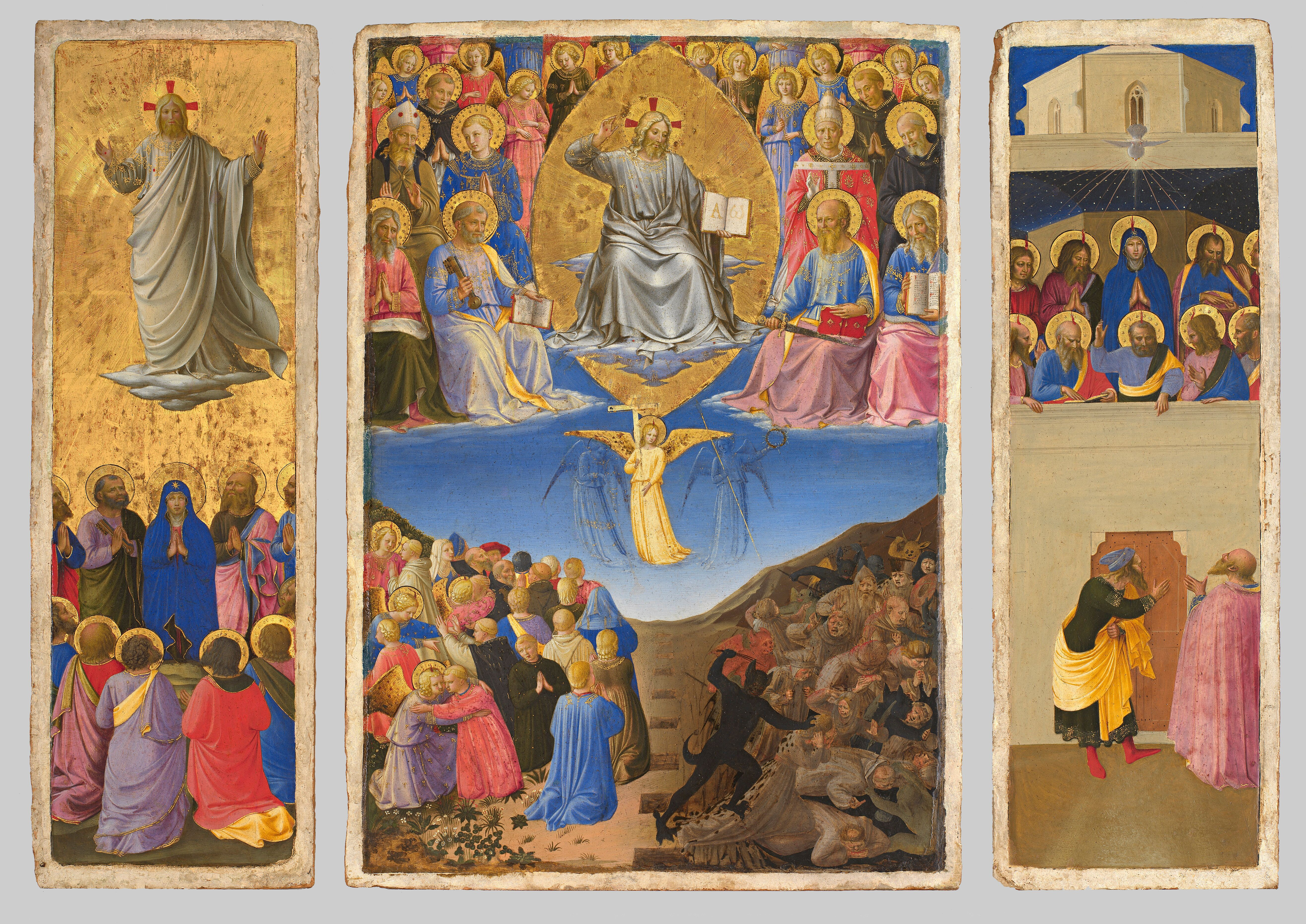 trittico del giudizio universale, ascensione e pentecoste